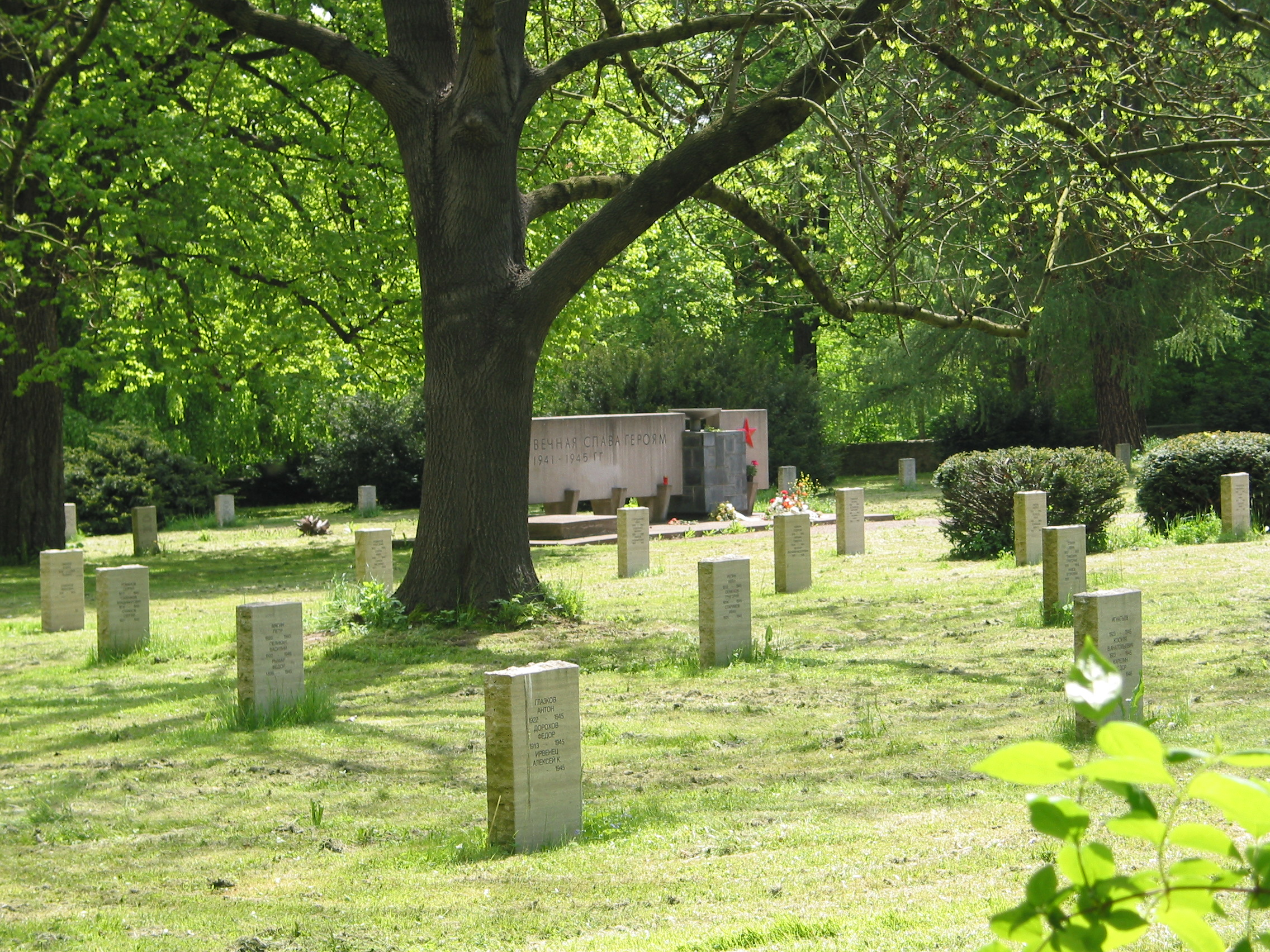 Der russische Friedhof im Park an der Ilm in Weimar.